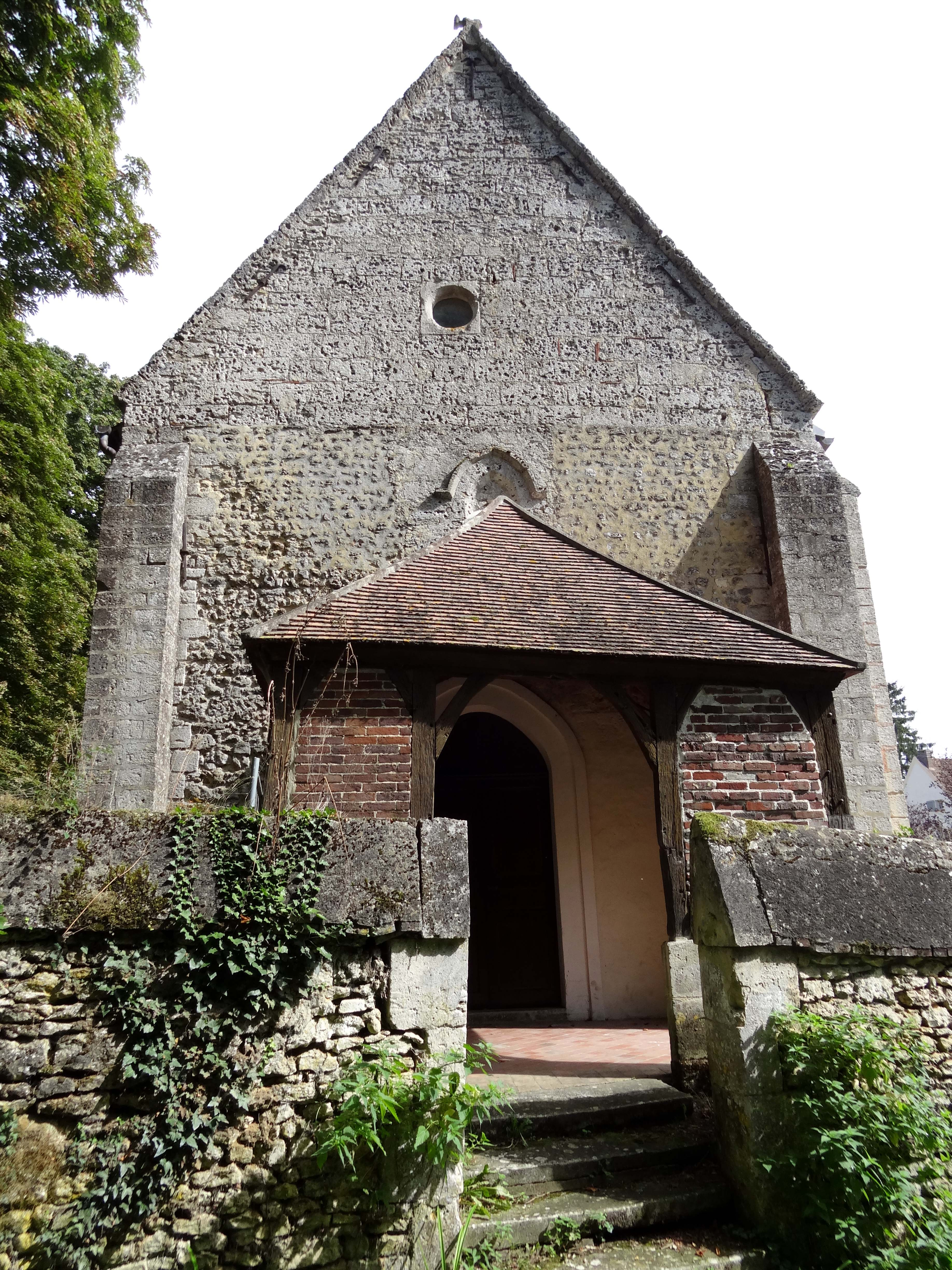 Église Saint-Remi de Ponchon - voir titre.